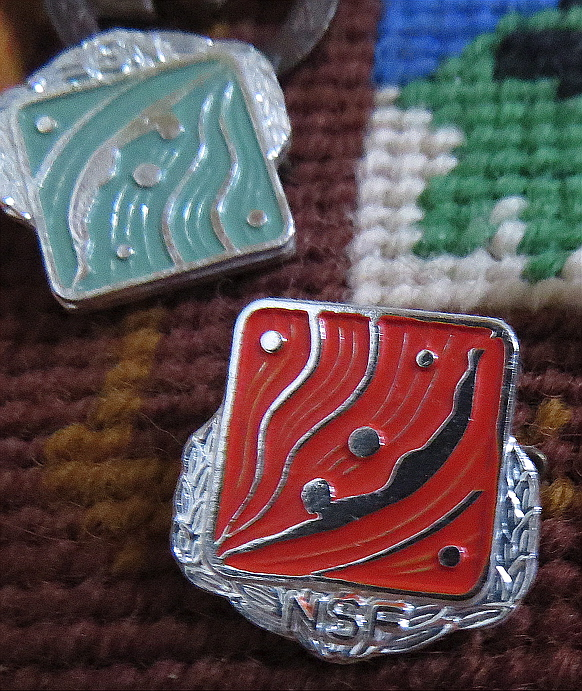 Svømmeknappen, færdighedsmærke, Norge